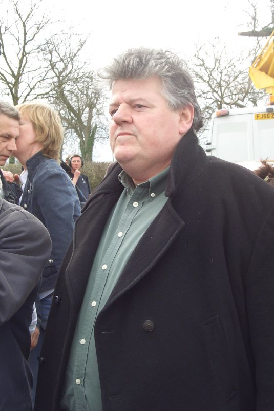 Robbie Coltrane